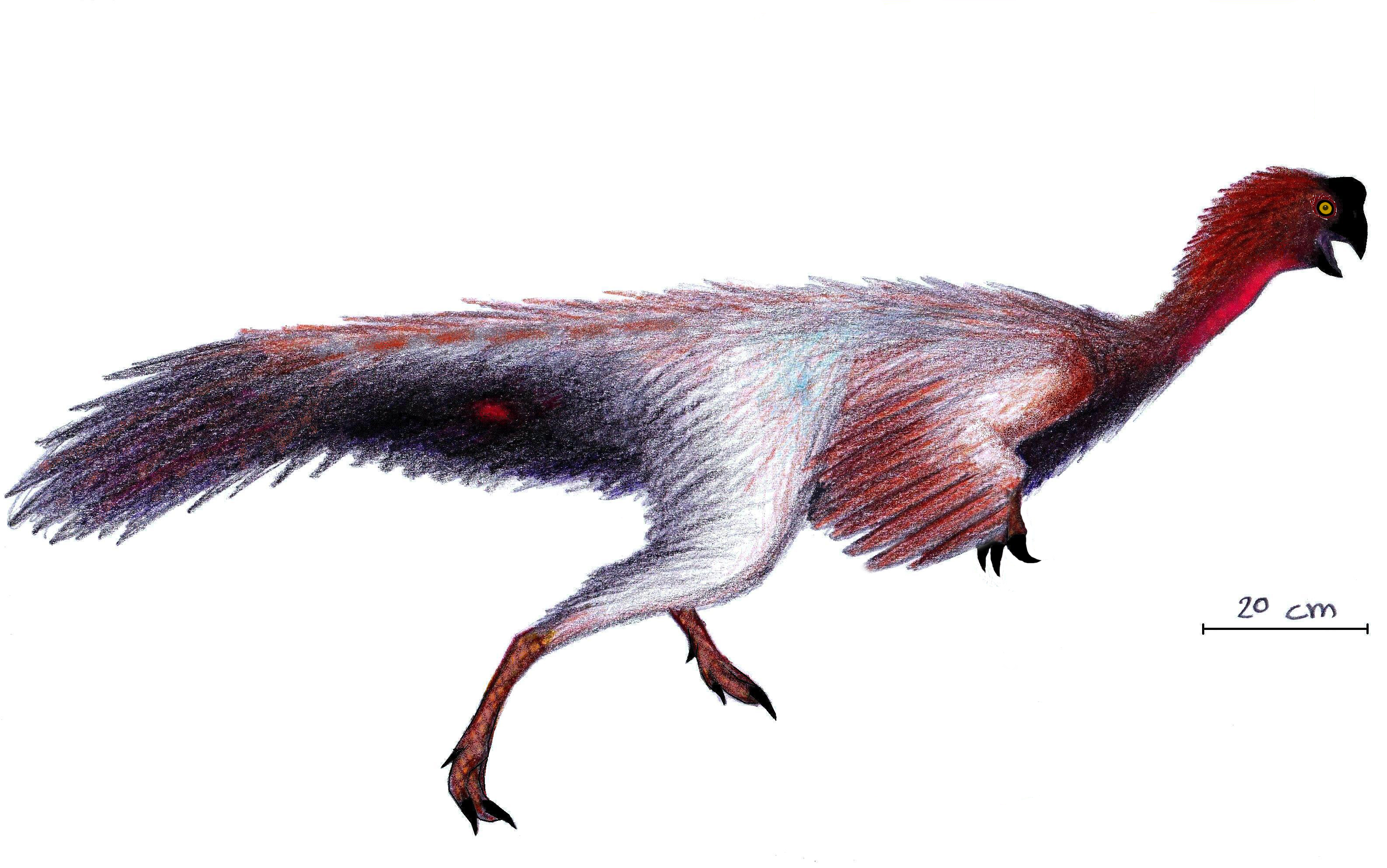 Ricostruzione di Jiangxisaurus